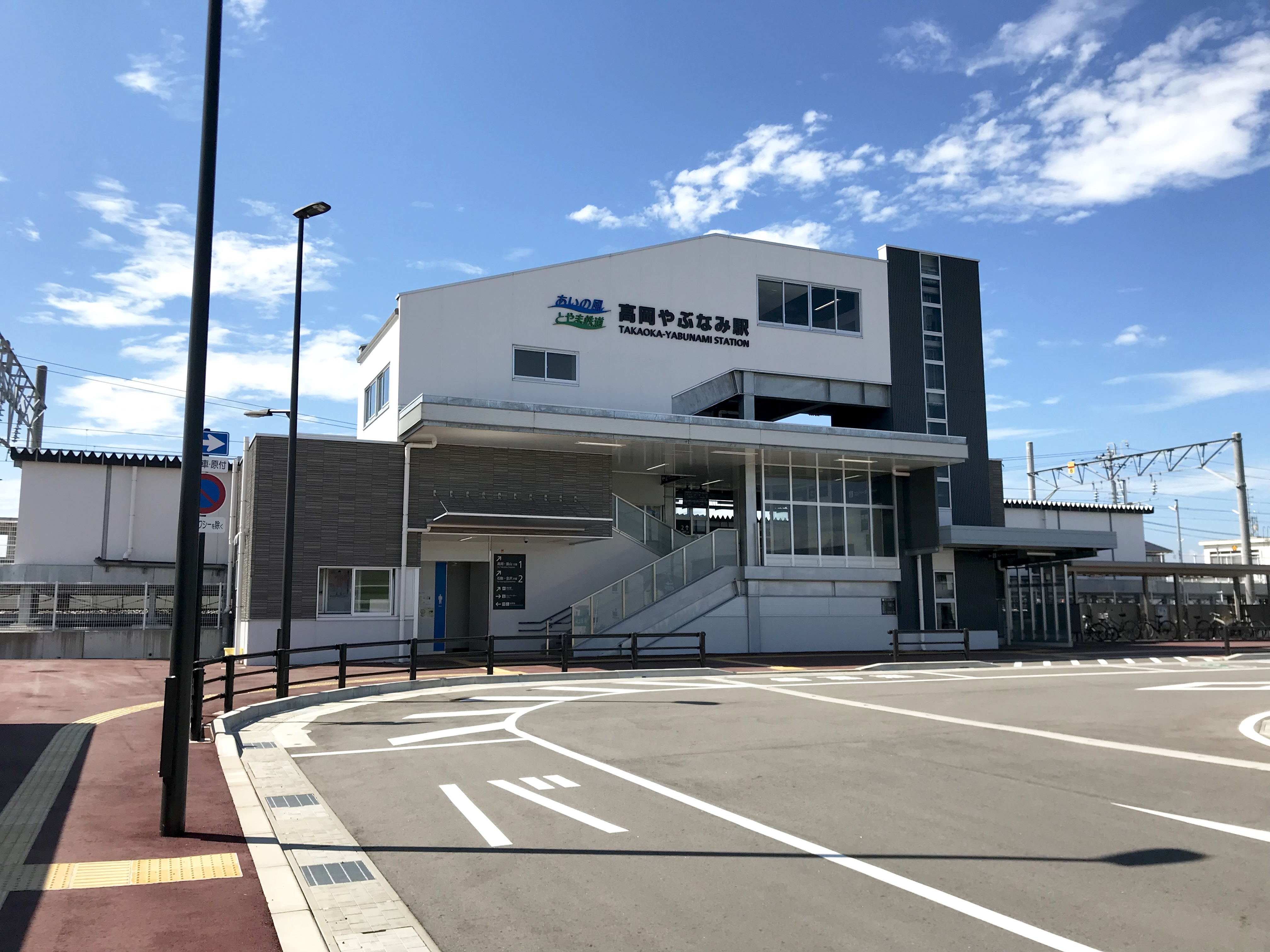 あいの風とやま鉄道高岡やぶなみ駅（東口）